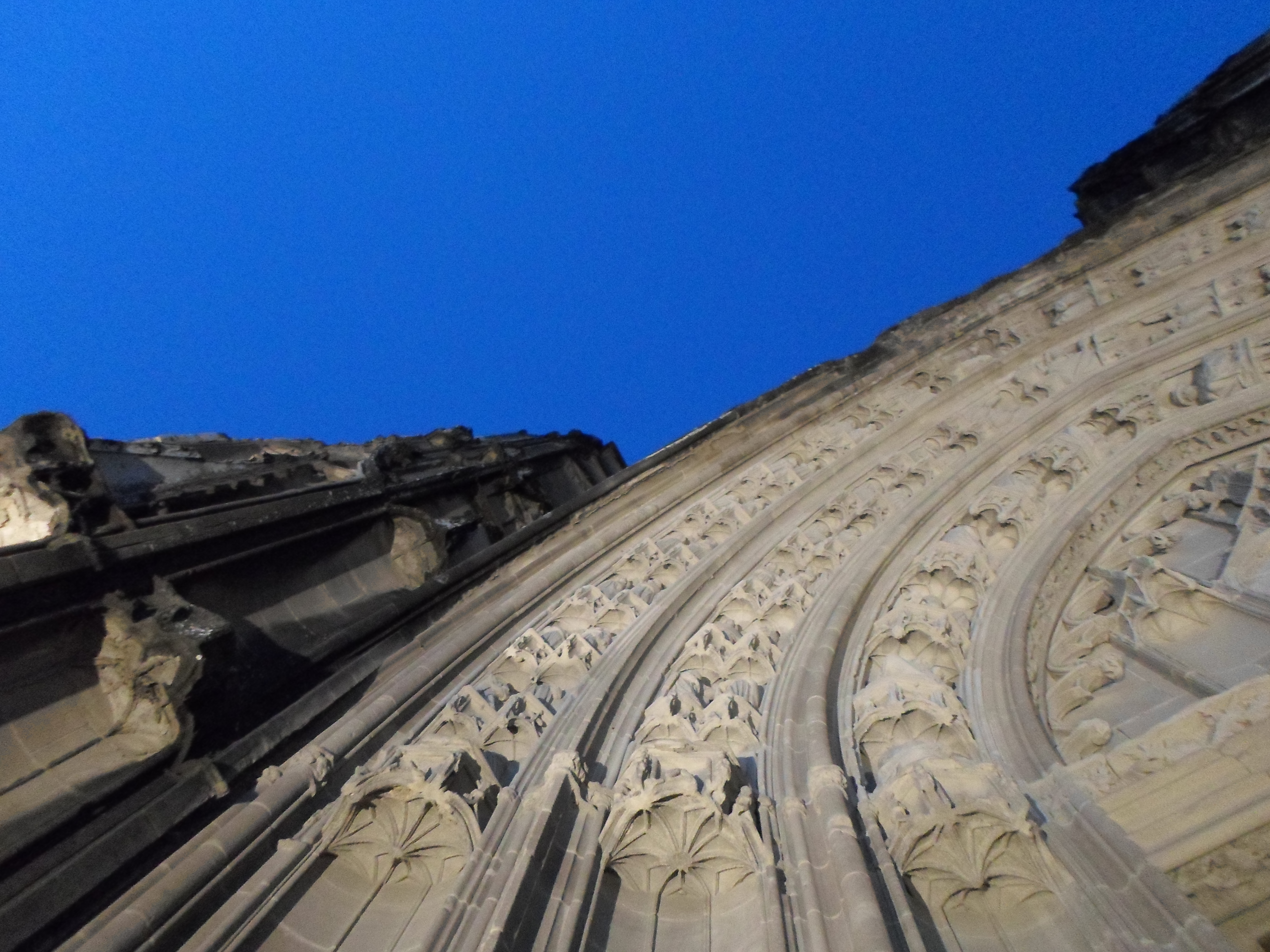 Église Notre-Dame de la Jayère Eglise Saint-Antoine-l'Abbaye by night 38160 PA38000020 VAN DEN HENDE ALAIN CC -BY-SA 4 0 050151 .